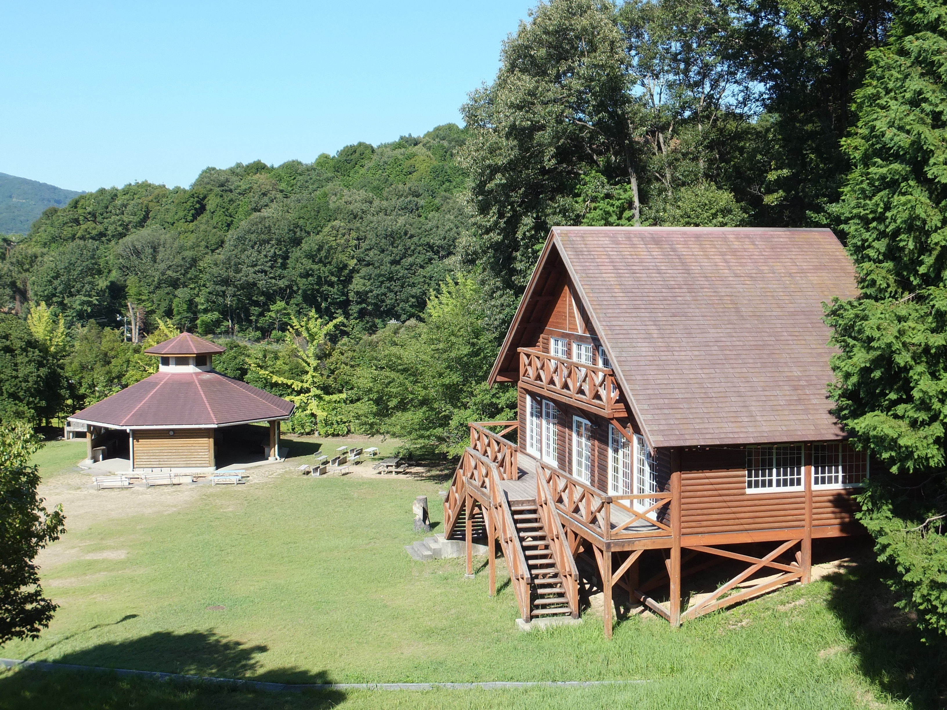 豊川市音羽運動公園。愛知県豊川市萩町口猿田1番地